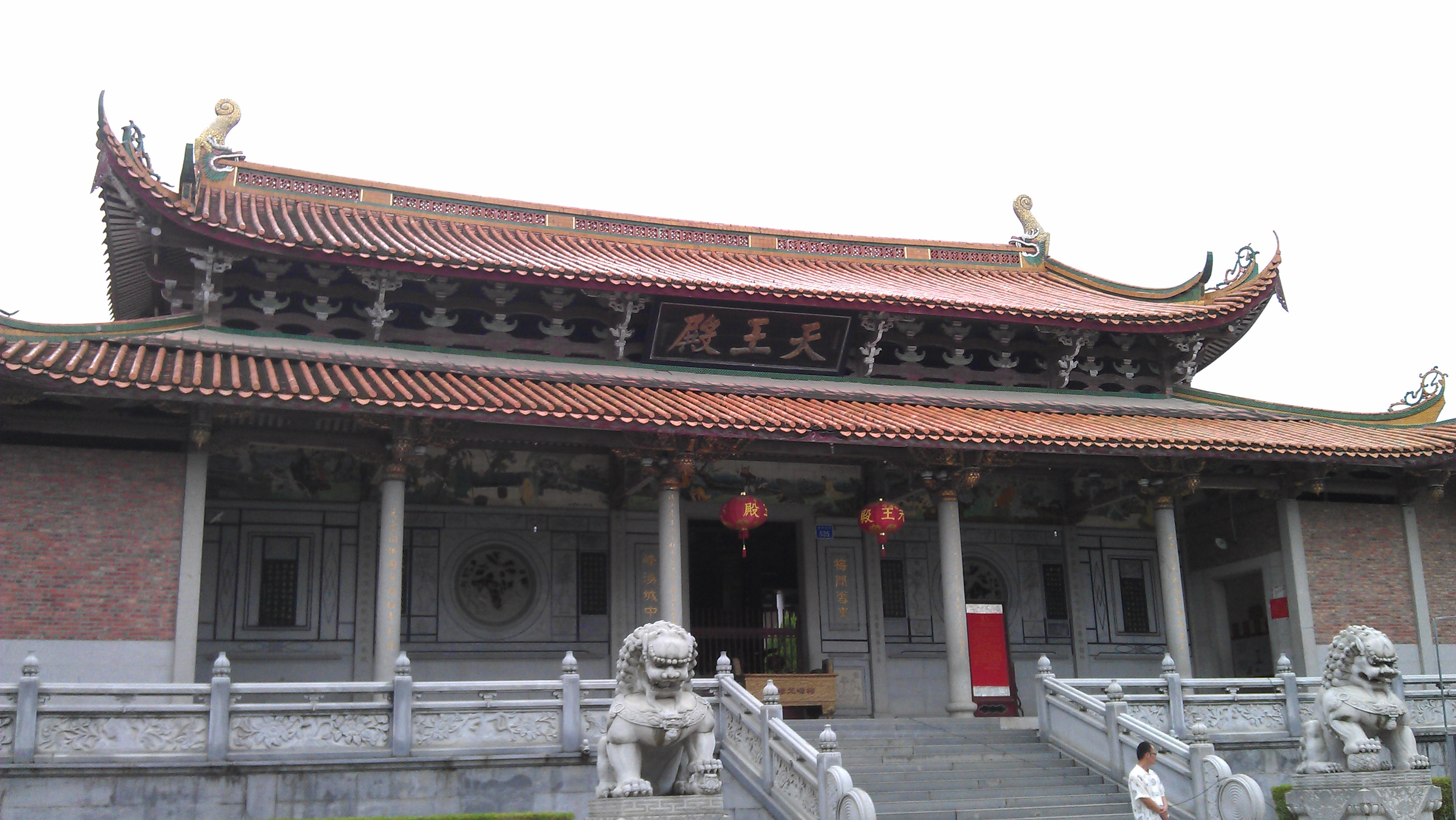 莆田梅峰寺天王殿